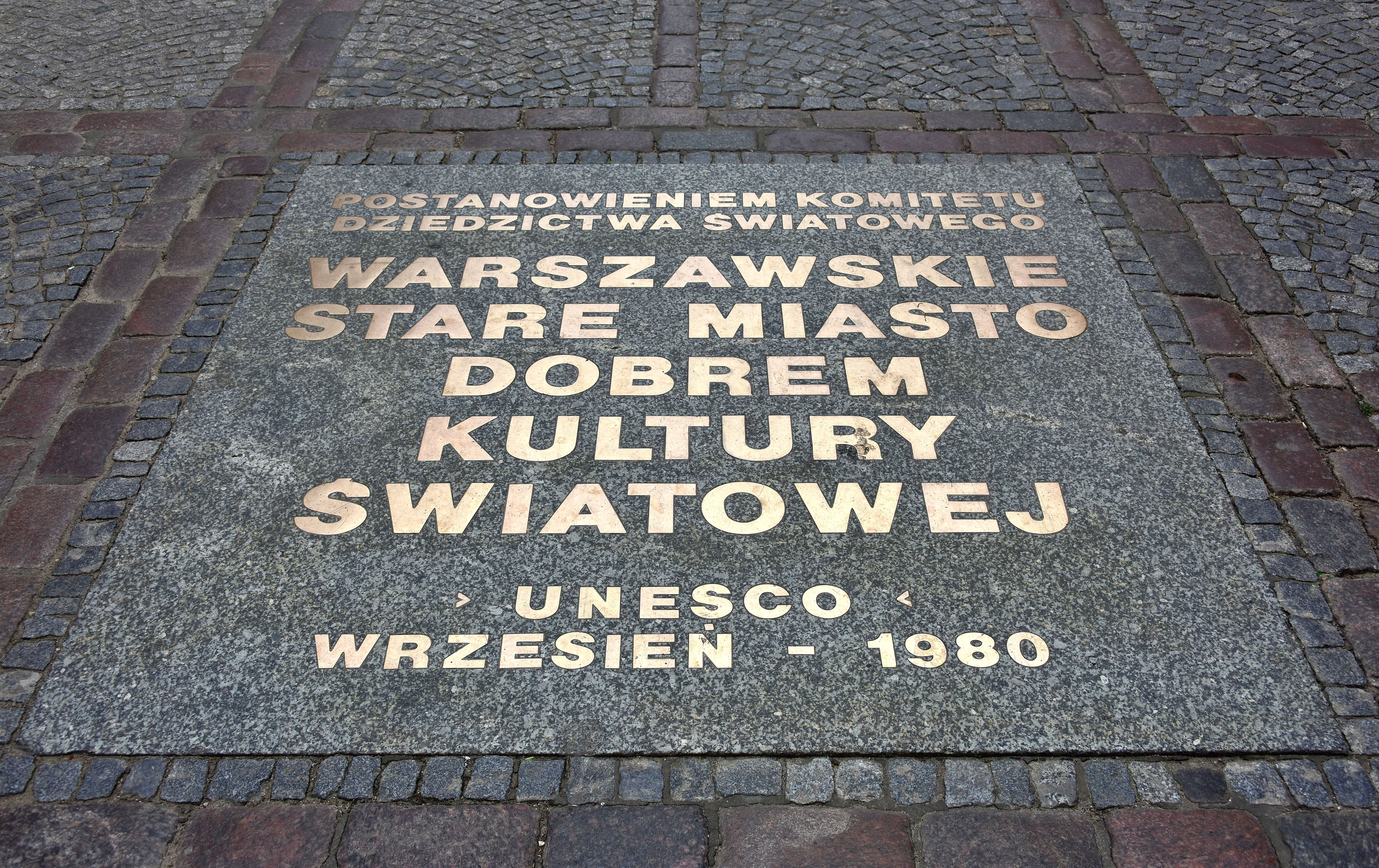 Tablica upamiętniająca umieszczenie warszawy na liście Światowego Dziedzictwa UNESCO wmurowane w bruk ul. Zapiecek w Warszawie